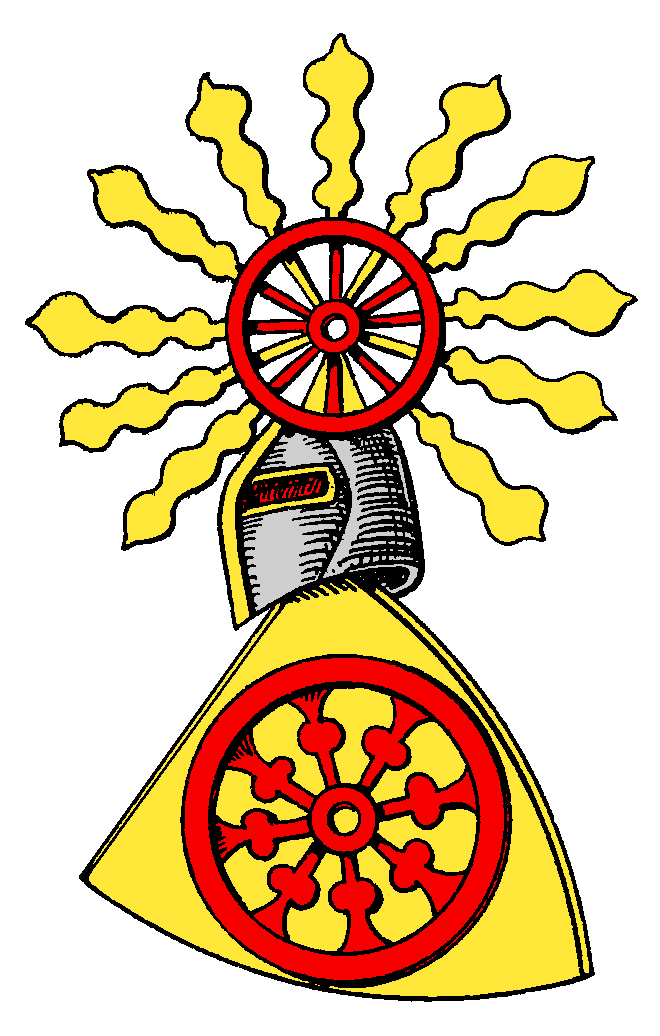 Wappen der Bolanden - Siegel des Philipp von Bolanden von 1289